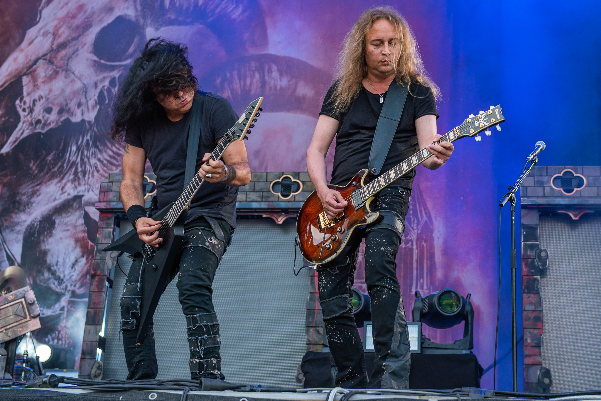 ARGO-Konzerte,Beck's Park Stage,Festival,Konzert,Kreator,Livekonzert,Livemusik,Mille Petrozza,Musik,RiP,Rock im Park 2018,Sami Yli-Sirniö